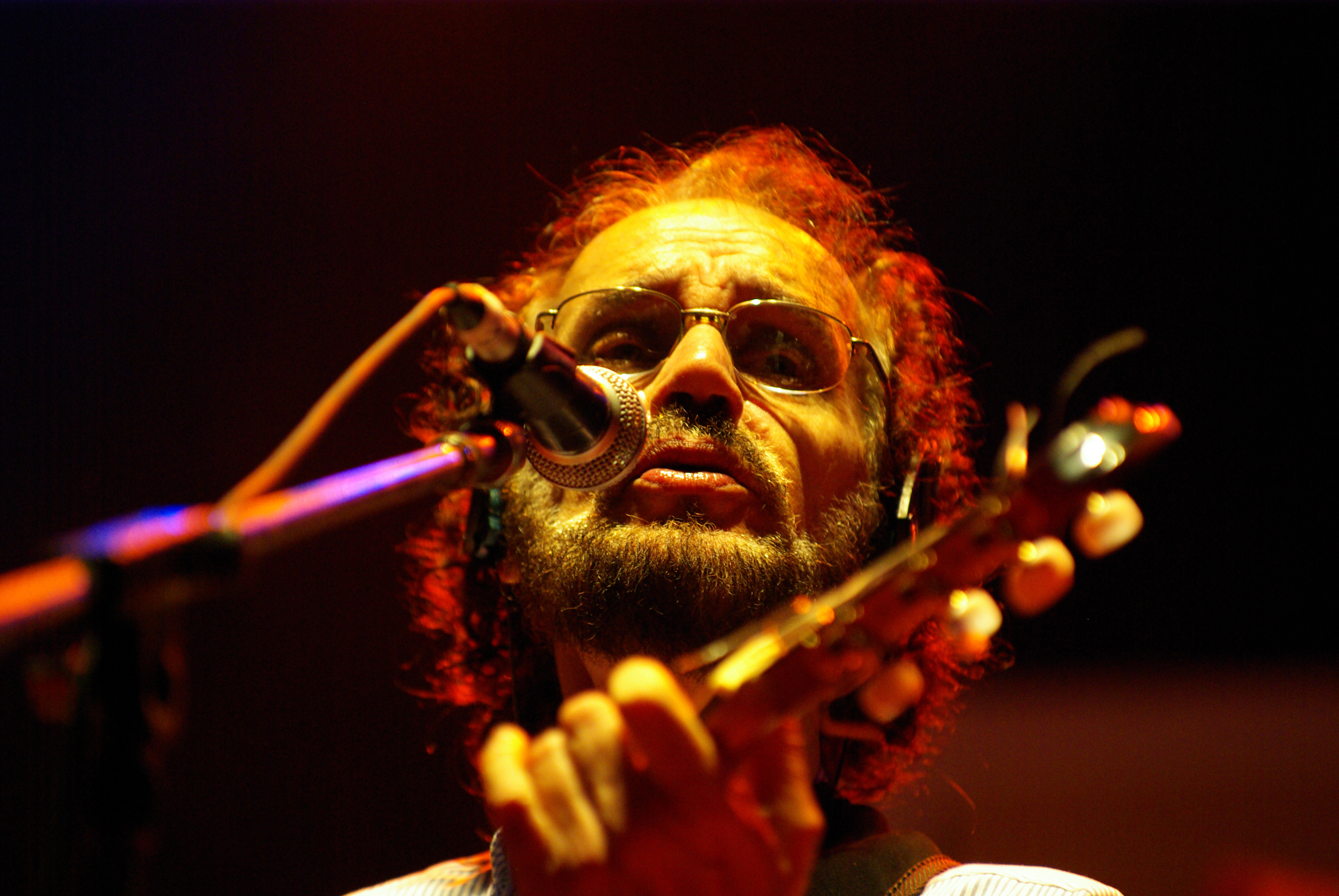 O compositor e cantor brasileiro Renato Teixeira